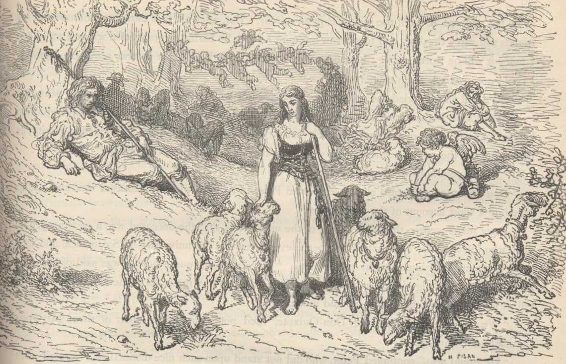 "Crisóstomo enamorado da bela Marcela" (1863), iIustração por Gustave Doré para “Don Quixote“ de Miguel de Cervantes.